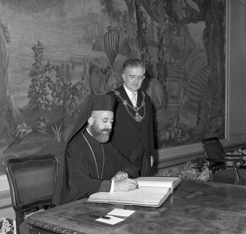 Staatsbesuch Zypern Eintragung in das goldene Buch der Stadt Bonn